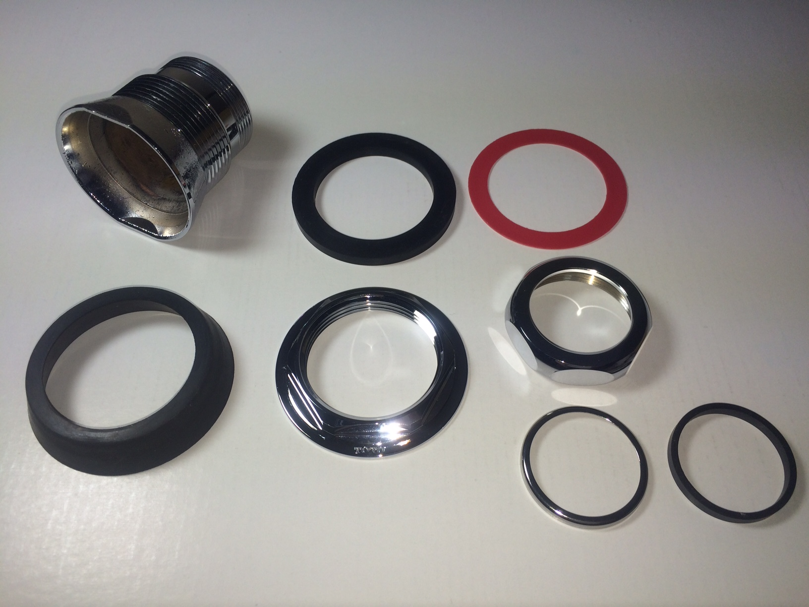 スパッド構成部品